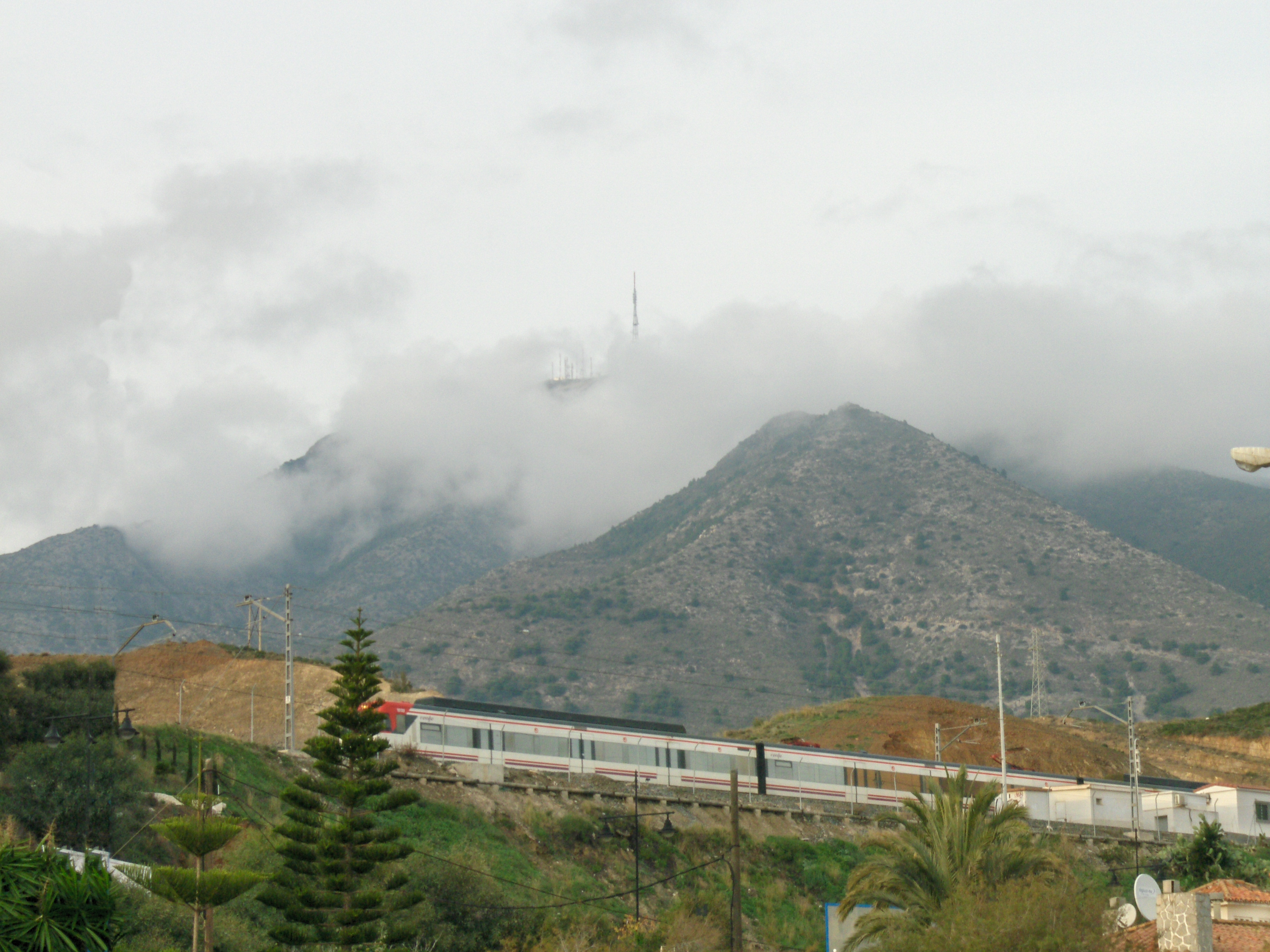 Tren de cercanías Málaga-Fuengirola a su paso por el término municipal de Fuengirola. Al fondo la Sierra de Mijas.